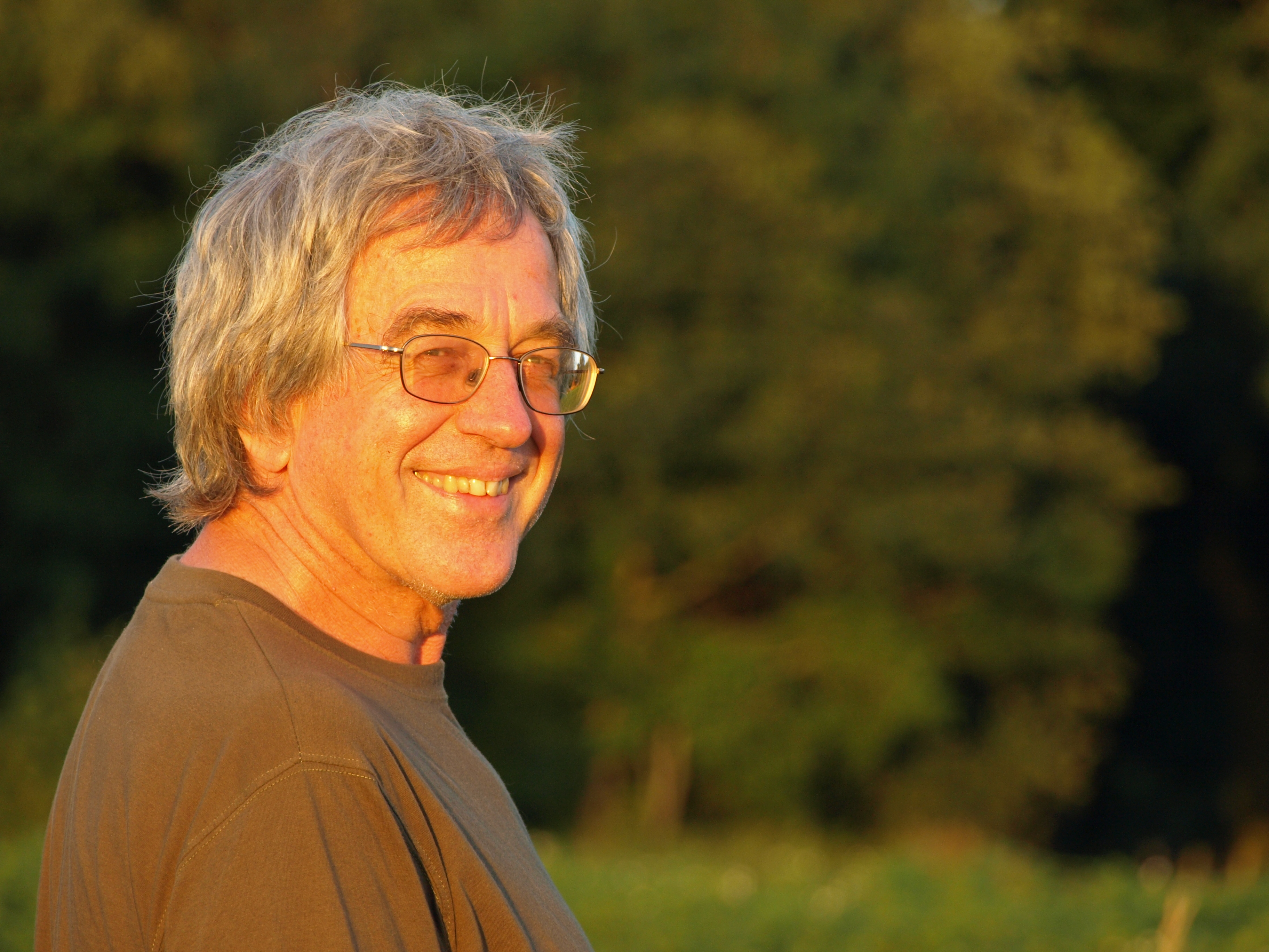 Nederlands schrijver